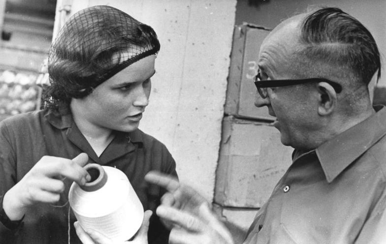 Schwarza, finnische Oberschülerinnen Zentralbild Liebers 4.8.1967 Schwarza: Finnische Oberschülerinnen im Chemiefaserwerk Marjatta Korhonen gehört zu den 10 finnischen Oberschülerinnen, die zur Zeit zu einem Sprachpraktikum im Chemiefaserwerk Schwarza weilen. Lehrmeister Fritz Grüttner betreut die Mädchen bei der Arbeit im Dederonbetrieb.